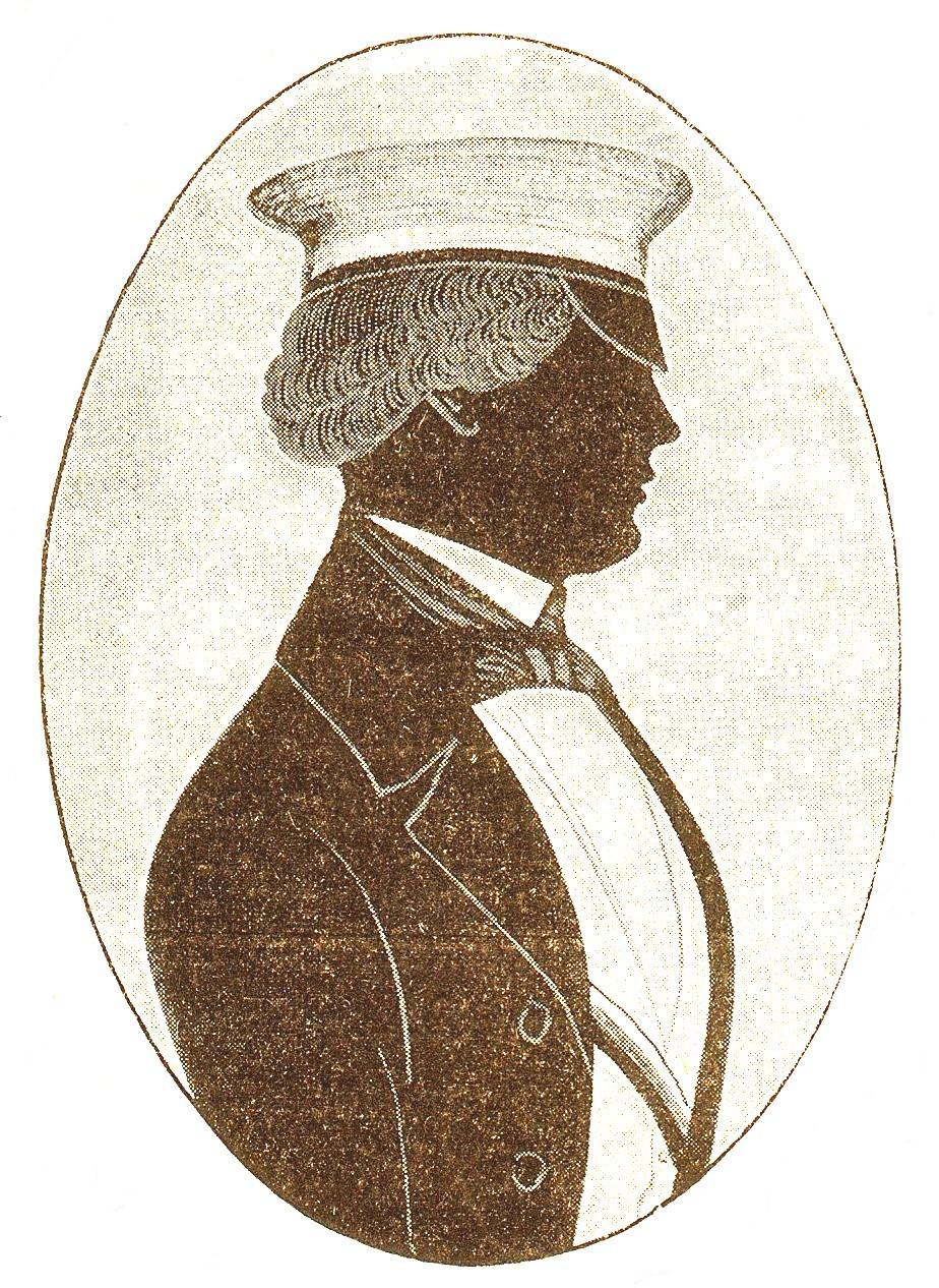 Robert Bosse als Heidelberger Schwabe